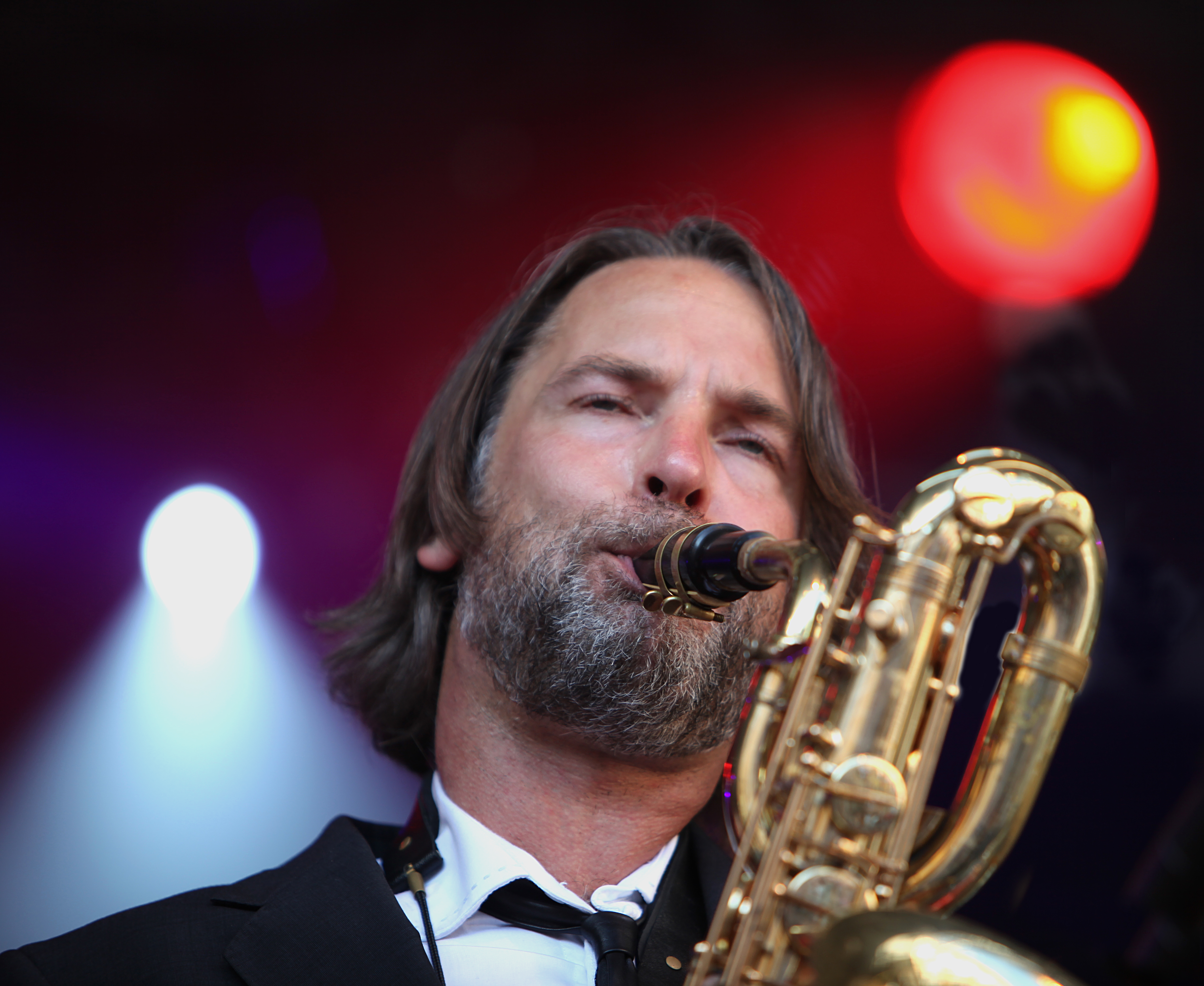 Per Ruskträsk Johansson at Stockholm Jazz Fest 2009.